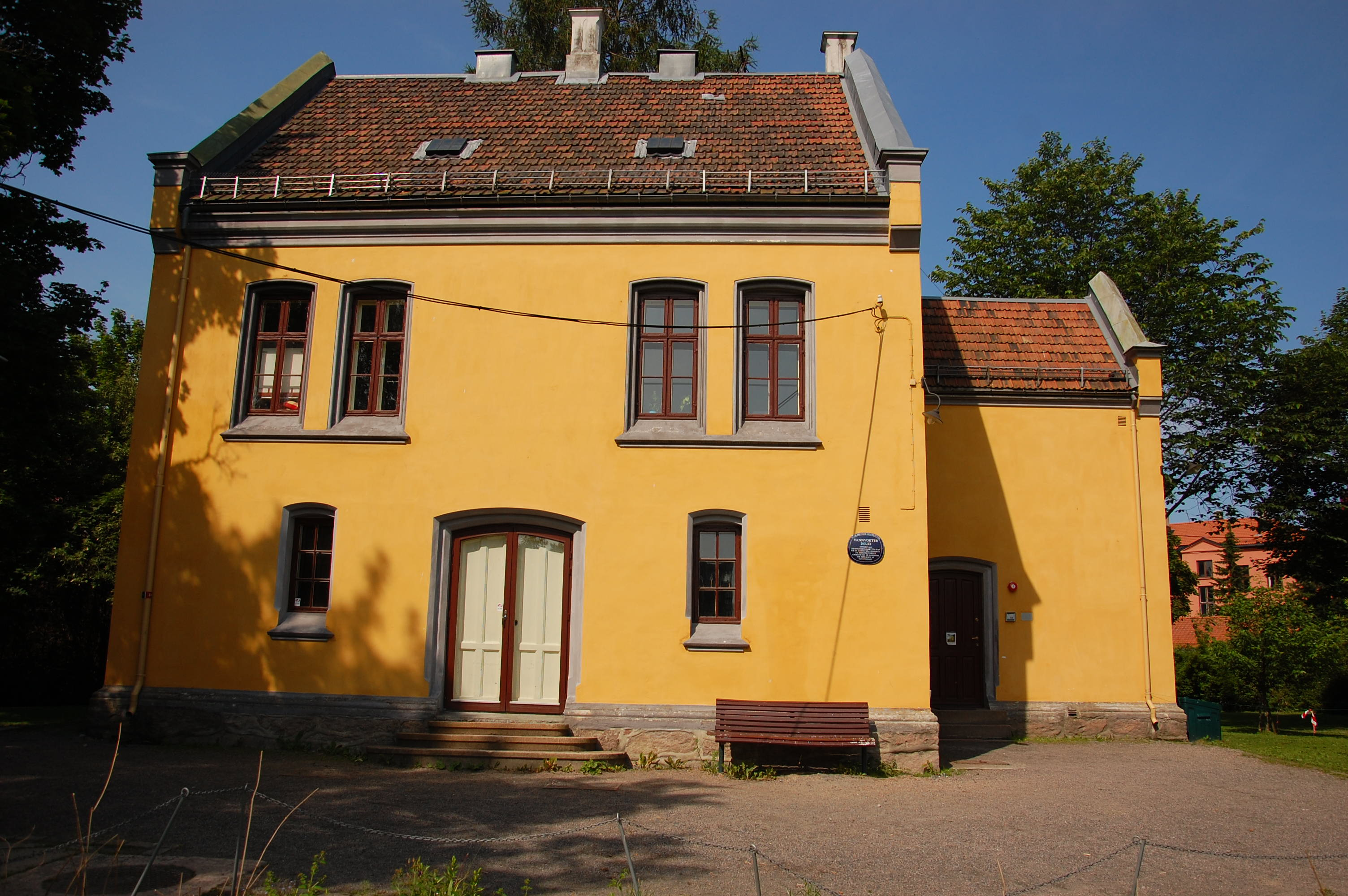 Vannvokterboligen Heftyeløkken, Riflegata 13, Bjølsen/Oslo